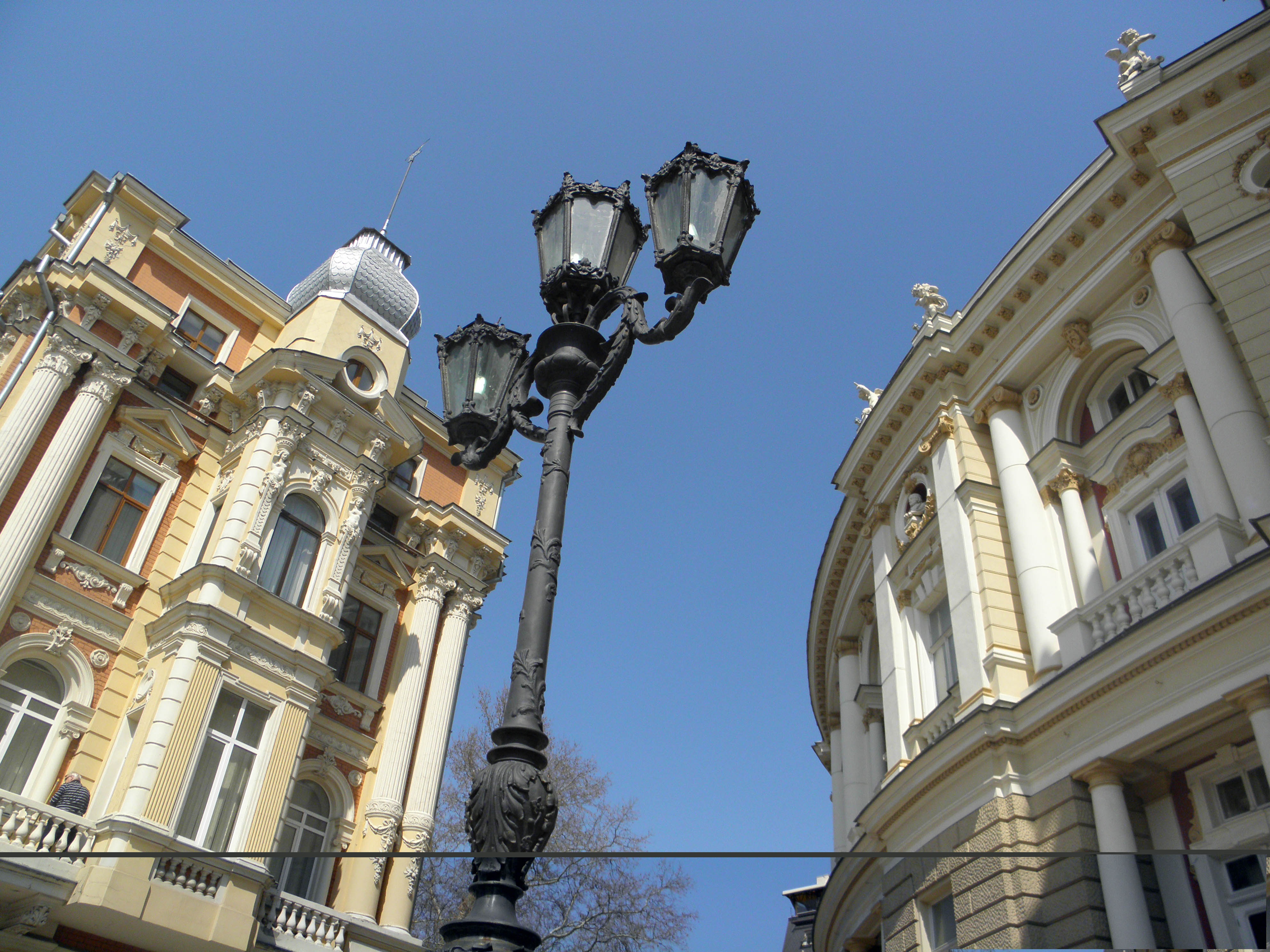 Будинок театру опери та балету, на балконі якого 10 квітня 1944 року було піднято прапор на честь звільнення м. Одеси від фашистських загарбників, Одеса, пров. Чайковського, 1, ріг вулиць Ланжеронівської і Рішельєвської